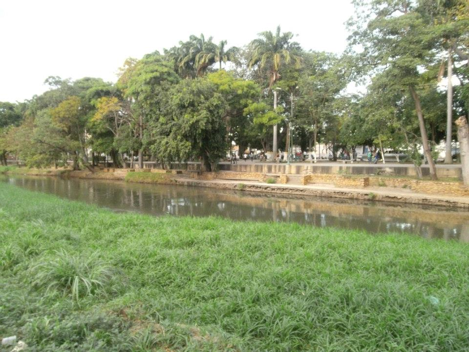 RIO MANZANARES DE CUMANA